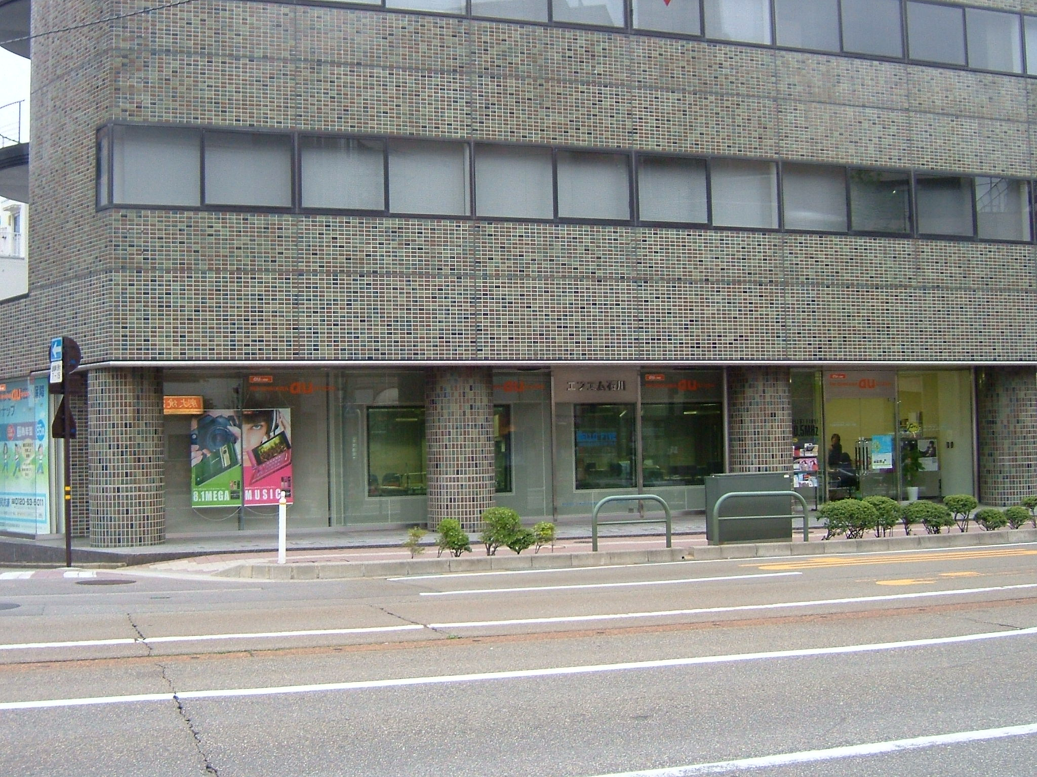 エフエム石川本社1階にあるオープンスタジオ（愛称：FM Ishikawa au Studio）